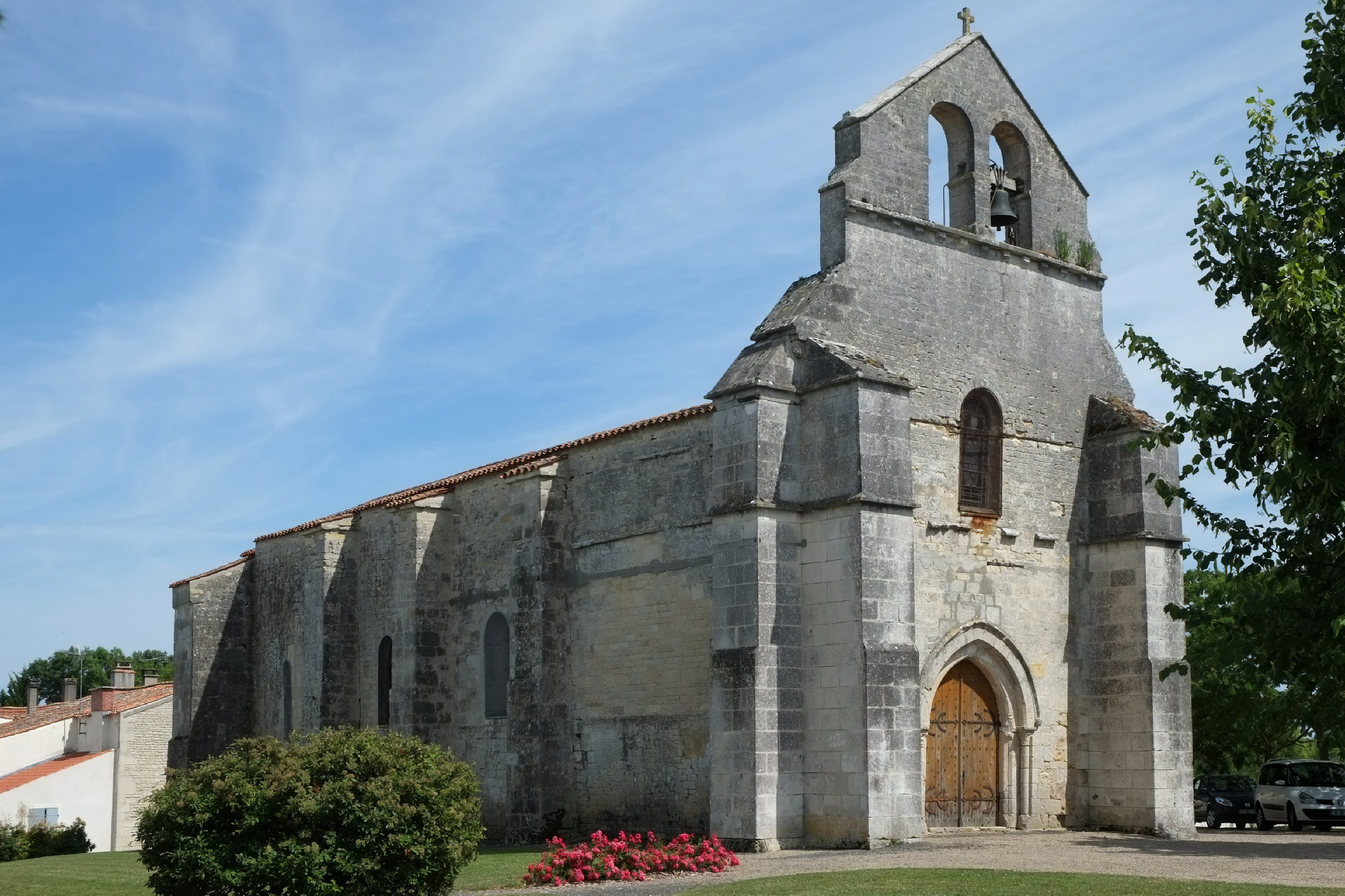 Église Notre-Dame de l'Assomption Vouhé Charente-Maritime France